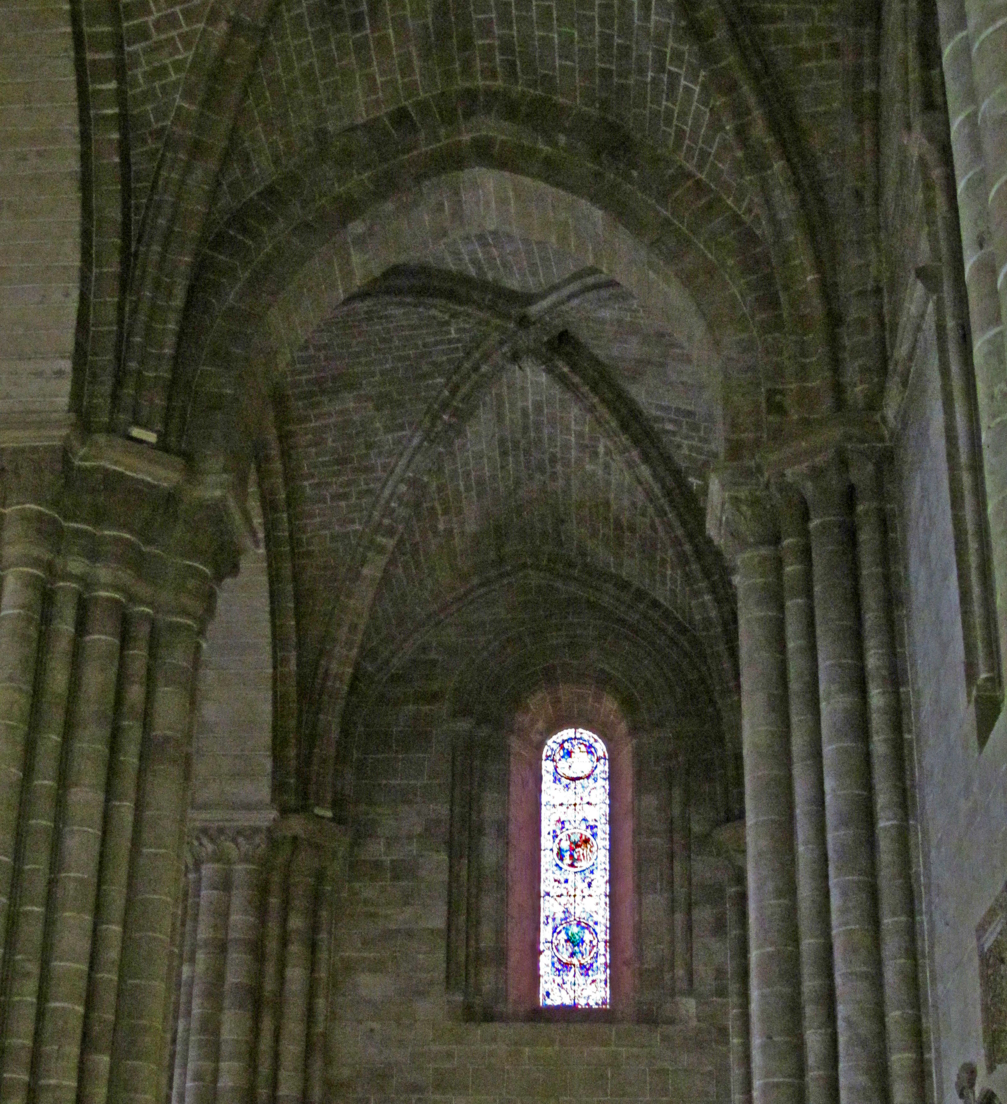 Bóveda de la nave lateral de la catedral de Sigüenza.Spain